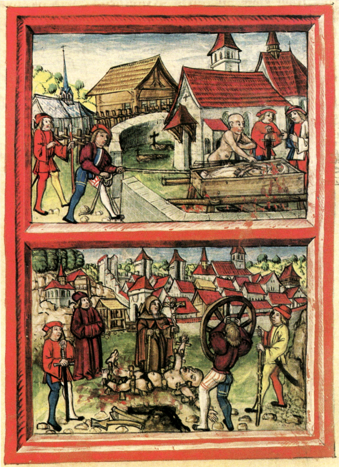 Oben: Der Söldner Hans Spiess wird durch eine Bahrprobe des Mordes „überführt“ (die Leiche seiner Frau beginnt bei Berührung zu bluten). Unten: Die darauf folgende Hinrichtung durch Rädern